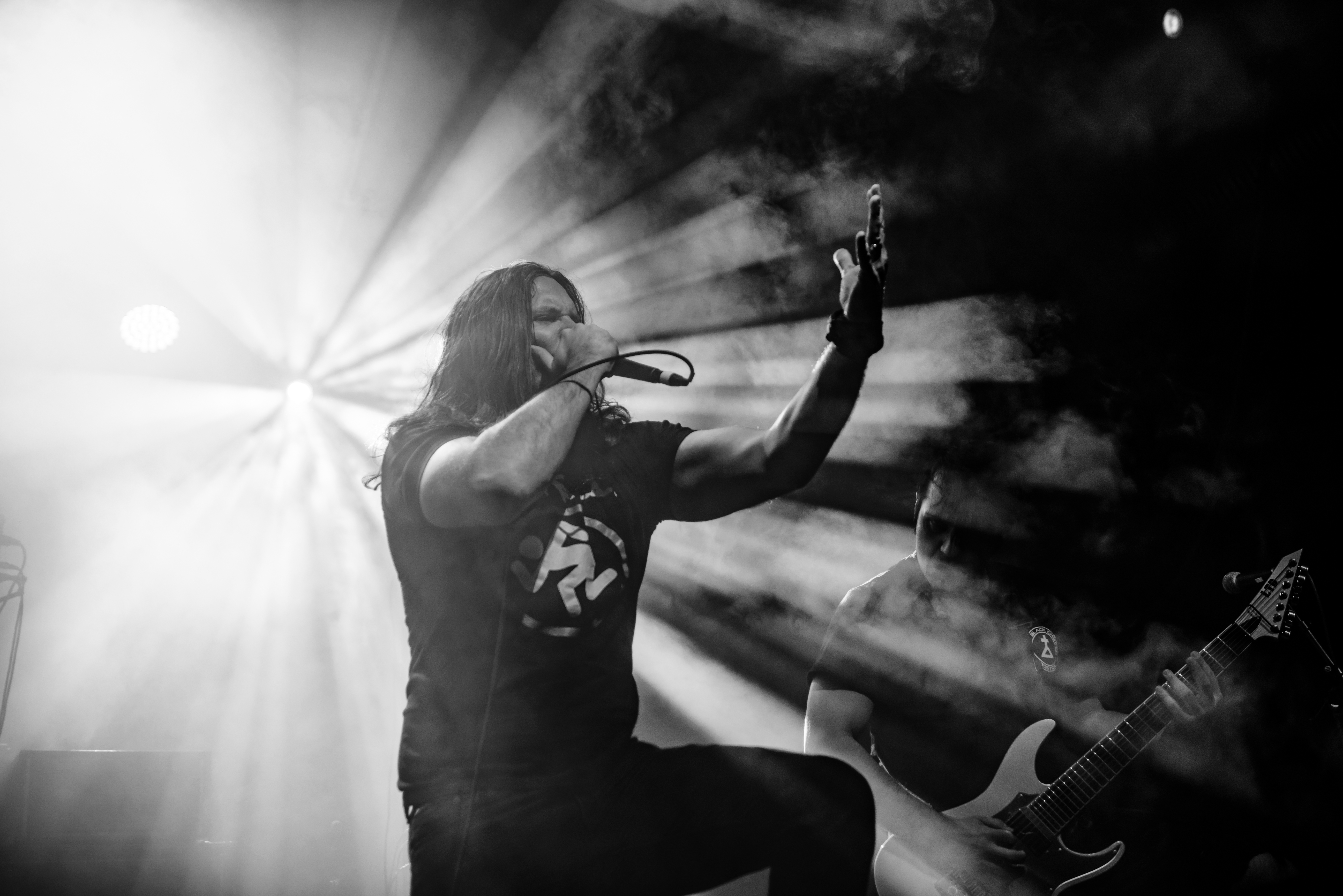 'Ruhrpott Metal Meeting 2016; Oberhausen Turbinenhalle': 'Unearth'